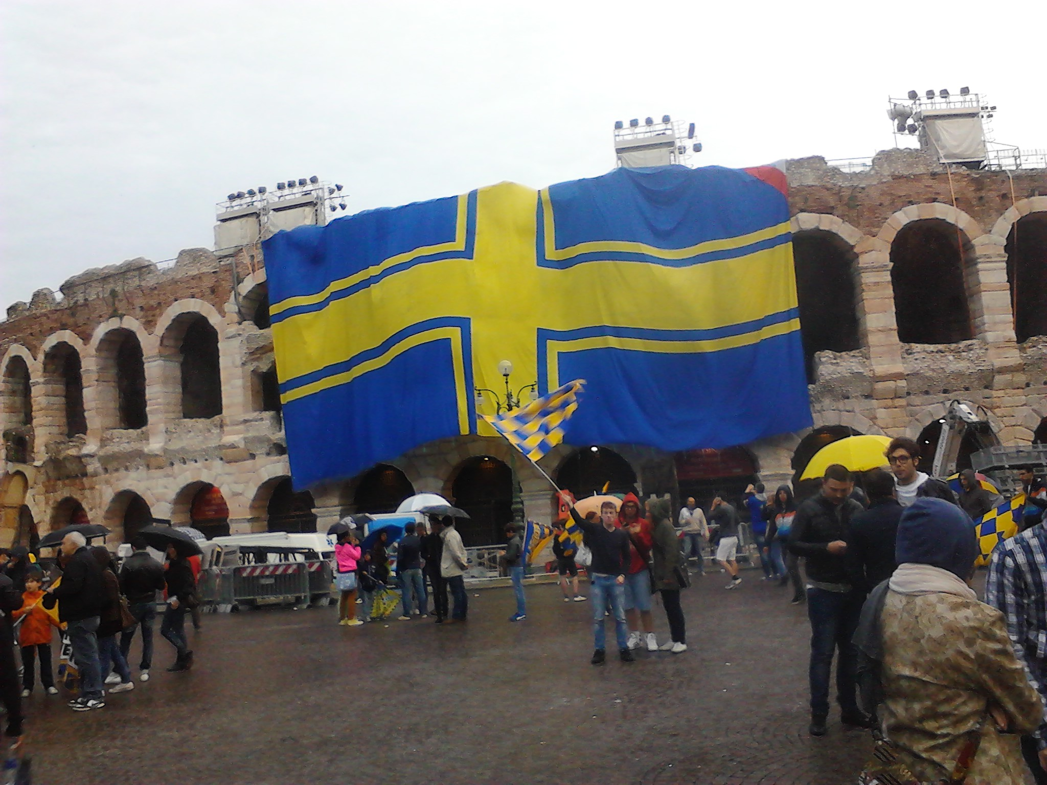 L'arena di Verona colorata di gialloblù dopo la promozione in Serie A della squadra nel 2013